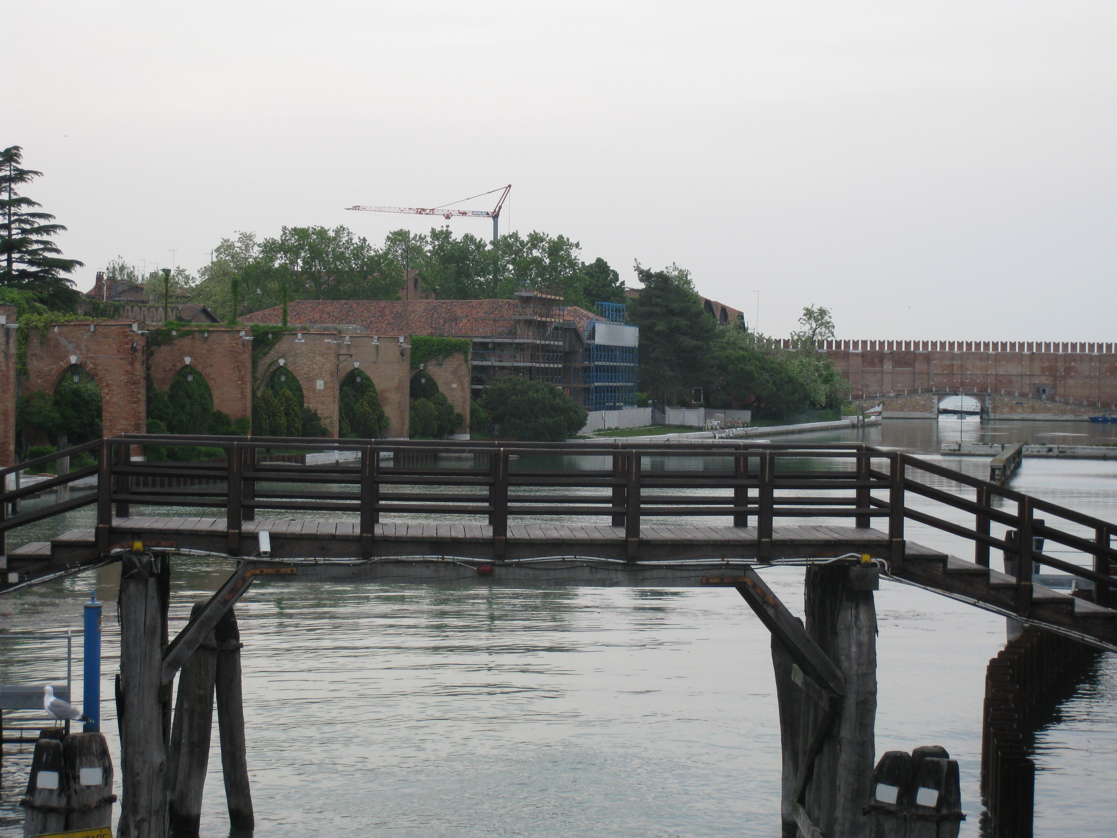 Arsenale הארסנלה